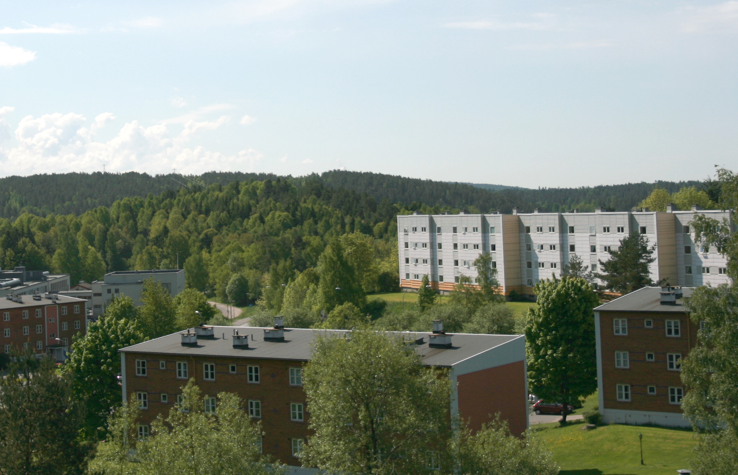 Rustadgrenda og Rustadsaga. Rustad i Oslo